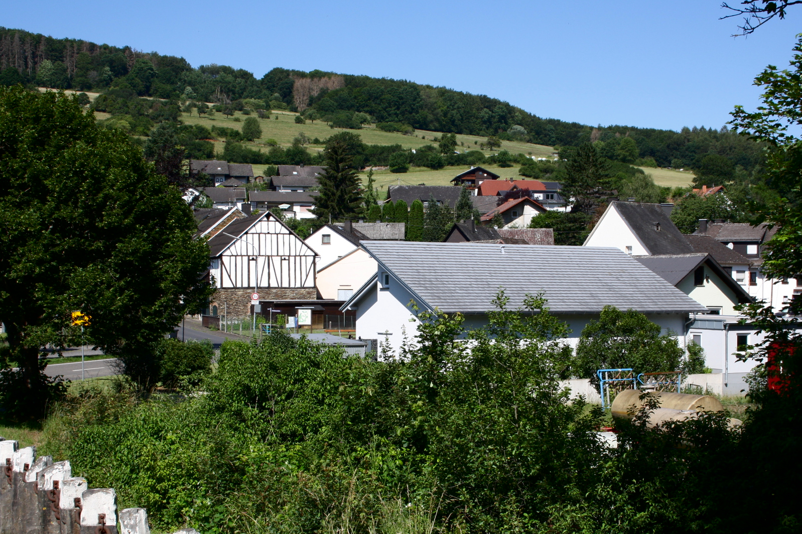 Ettersdorf, Ortsteil von Montabaur, Westerwald, Rheinland-Pfalz, Deutschland